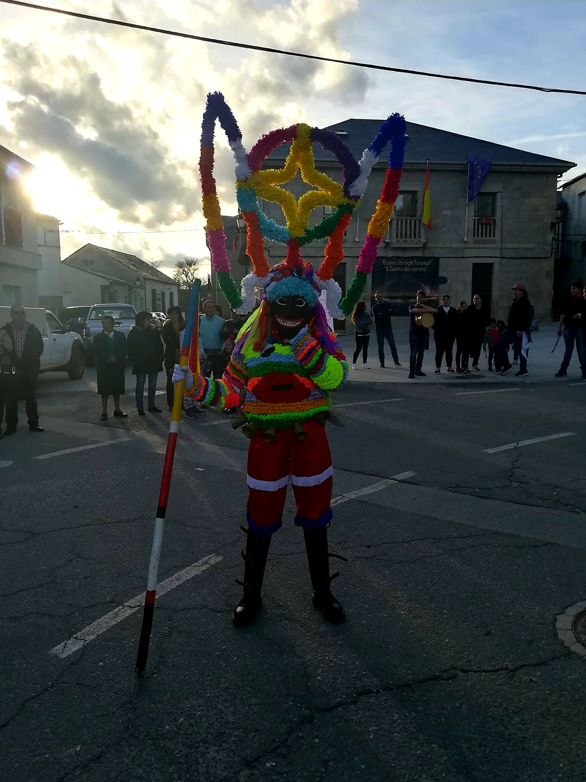 O boteiro é o personaxe máxico do Entroido de Viana do Bolo. Iste caracterízase pola súa gran careta, polas súas esquilas que teñen un gran son e pola súa monca que é o apoio para poder facer ises grandes saltos.